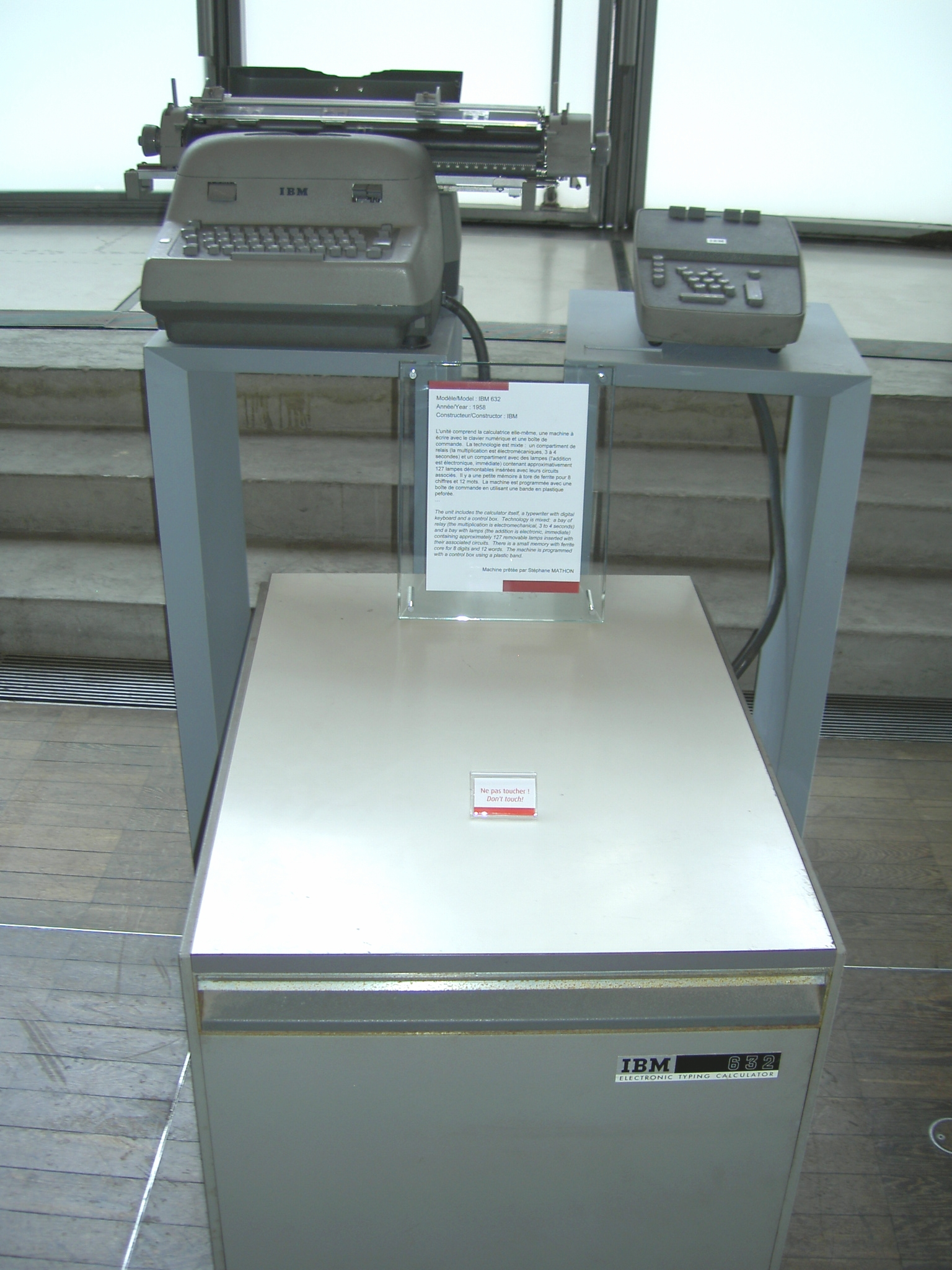 IBM 632 (1958)